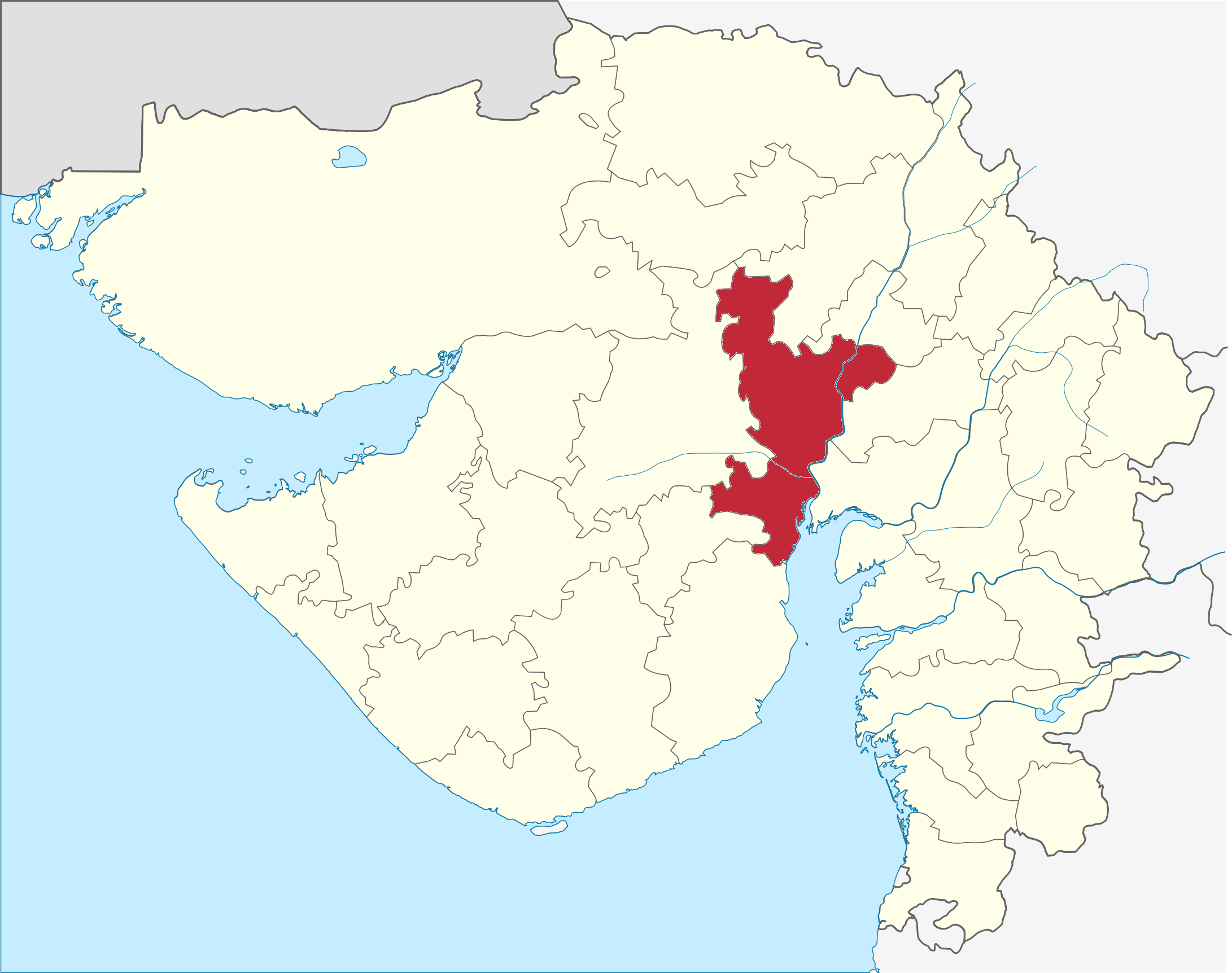 Distrito de Ahmedabad en Gujarat